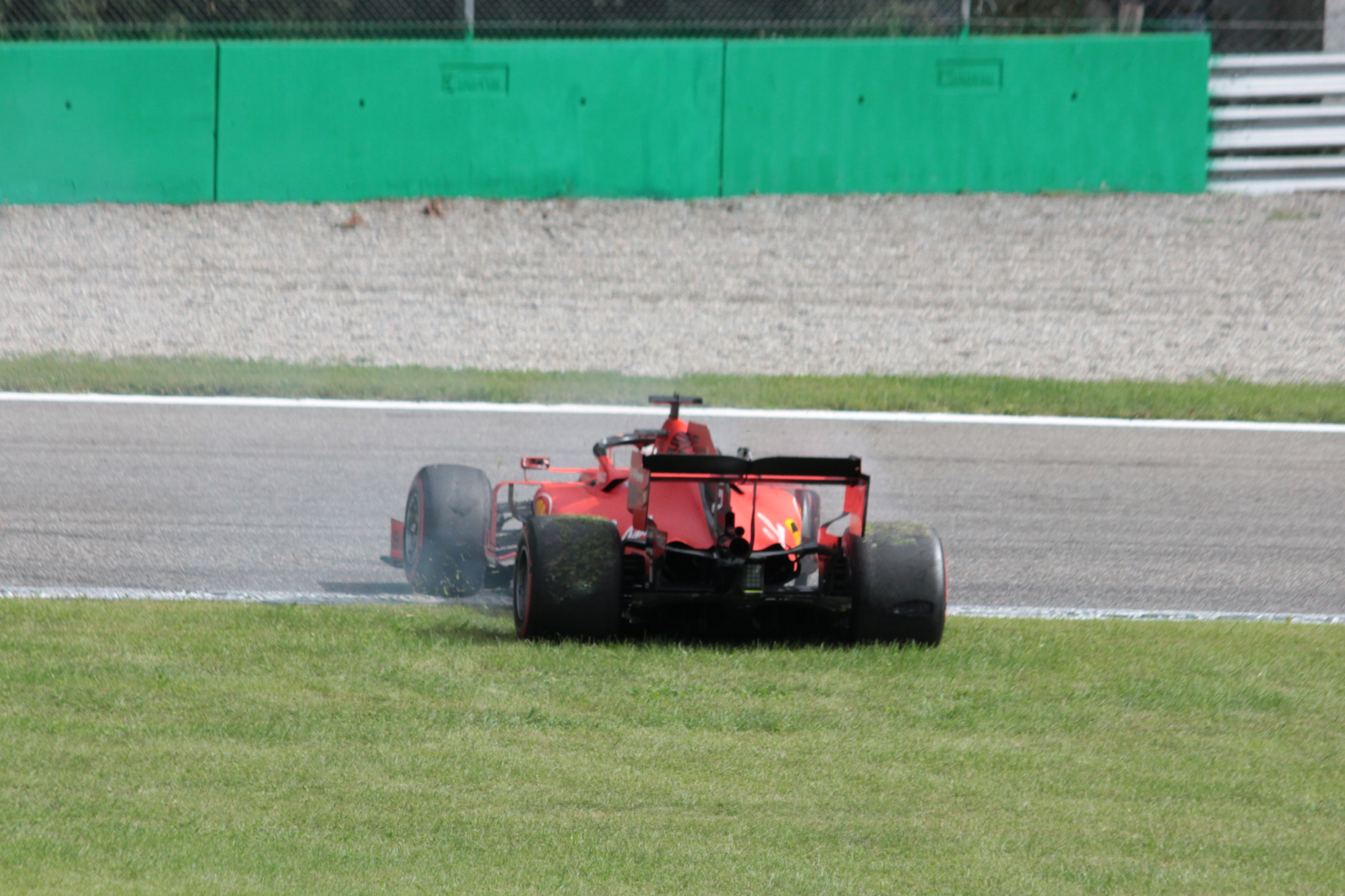 Sebastian Vettel in testacoda alla curva Ascari durante il Gran Premio d'Italia 2019.